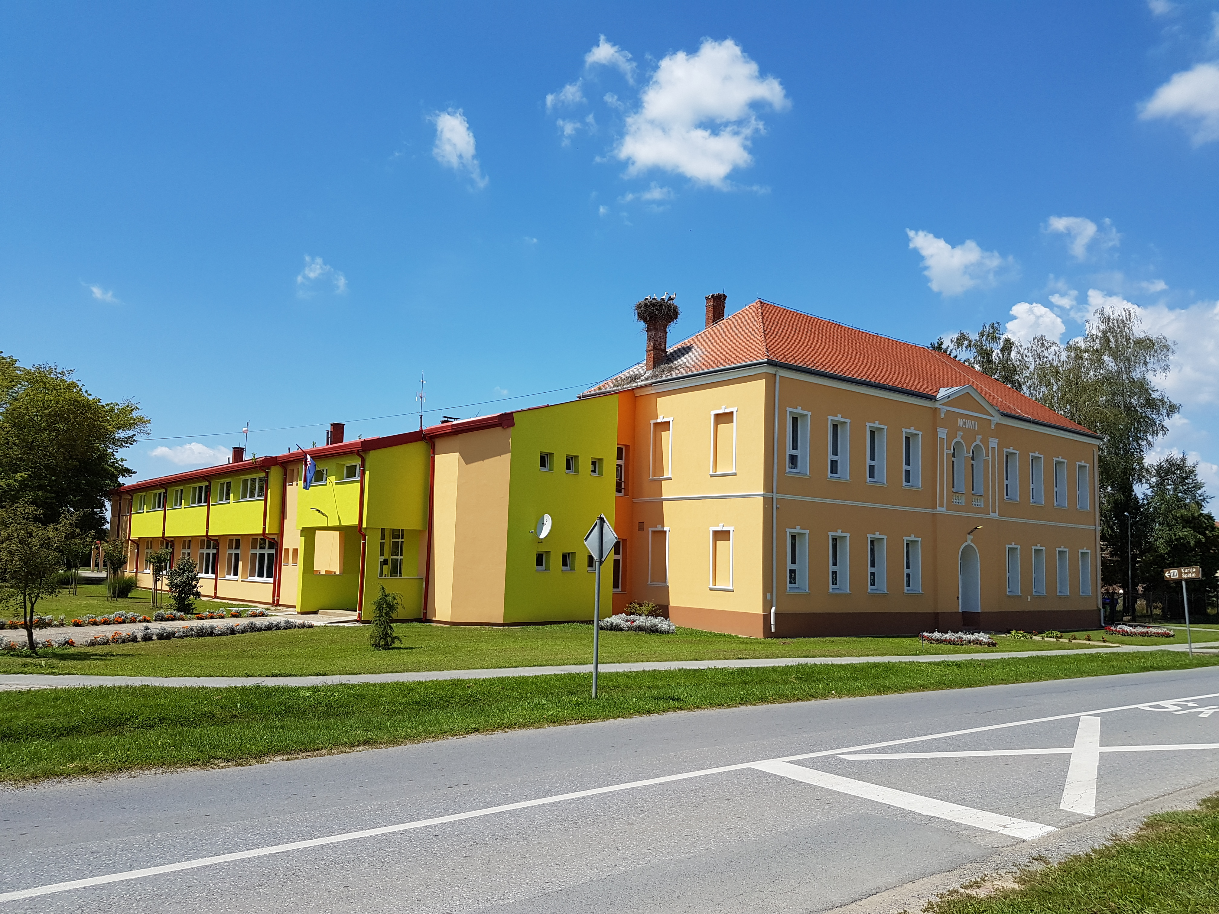 Osnovna škola "August Cesarec" u Špišić Bukovici